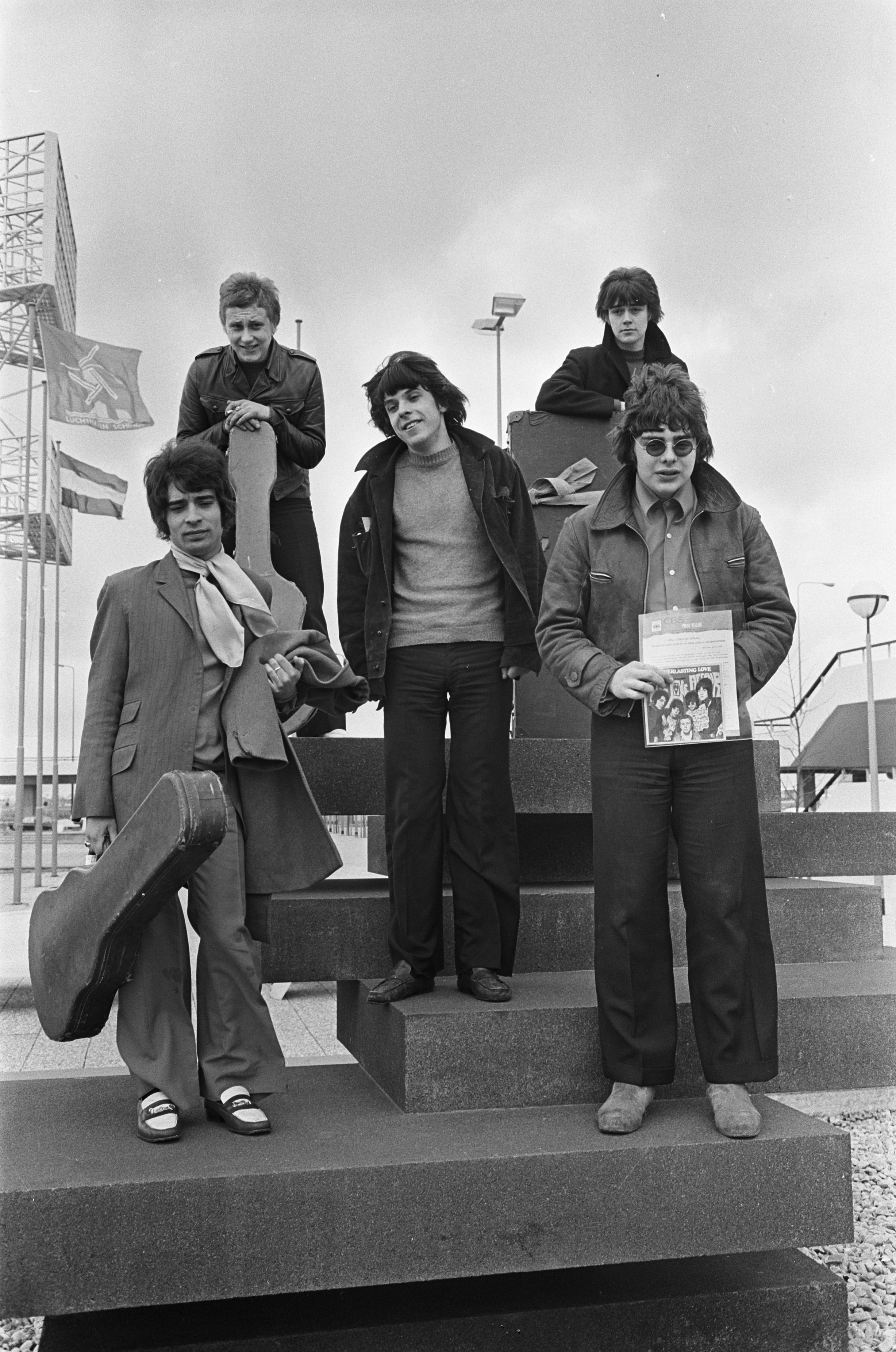 Collectie / Archief : Fotocollectie Anefo Reportage / Serie : [ onbekend ] Beschrijving : Aankomst Engelse beatgroep The Love Affair op Schiphol Annotatie : Ook genoemd: Love Affair Datum : 22 maart 1968 Locatie : Noord-Holland, Schiphol Trefwoorden : aankomst en vertrek, bands, popmuziek, vliegvelden Fotograaf : Koch, Eric / Anefo Auteursrechthebbende : Nationaal Archief Materiaalsoort : Negatief (zwart/wit) Nummer archiefinventaris : bekijk toegang 2.24.01.05 Bestanddeelnummer : 921-1871 Reacties Geplaatst door Musiclady op 18 maart 2015 - 21:08. Leden: Rex Brayley; Maurice Bacon; Mick Jackson; Steve Ellis; Morgan Fisher